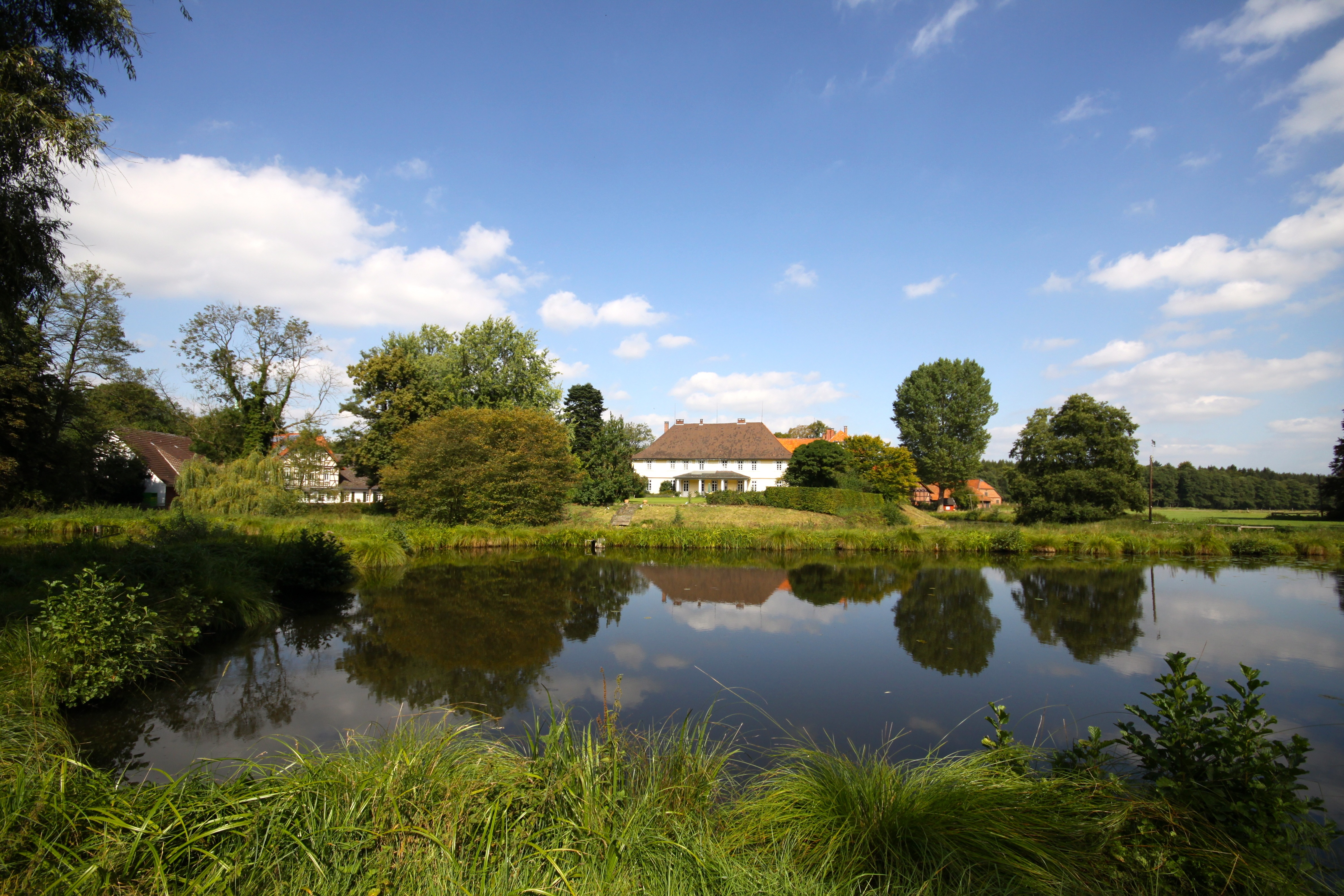 Der Gutshof in Stellichte